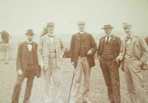 Teilnehmer an Hans Steffens Expedition zum Río Aisén, Chile 1897. Von links nach rechts: Per C. H. Dusén (schwedischer Botaniker, 1855-1926) Walter Siegfried Bronsart von Schellendorf (preußischer Oberleutnant bzw. capitán asimilado als Ausbildungsoffizier in Chile, 1871–1963) Hans Steffen (deutschchilenischer Geograph, 1865-1936), in Chile Juan Steffen Hoffmann Walter Graf von Königsmarck (preußischer Oberleutnant bzw. capitán asimilado als Ausbildungsoffizier in Chile) Oskar von Fischer (Däne, Topograph und Astronom)